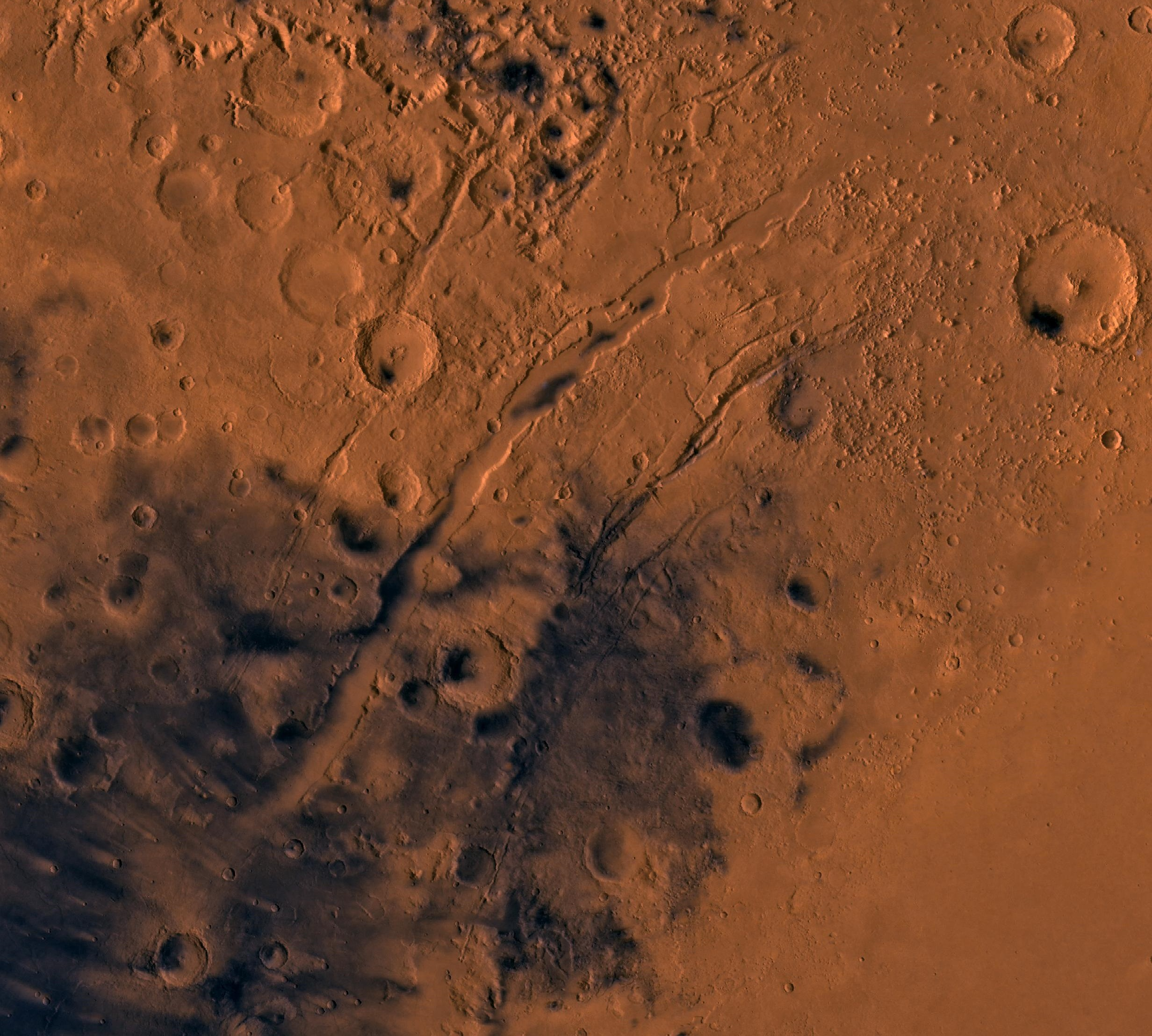 Formation de Nili Fossae, quadrangle de Syrtis Major, planète Mars.